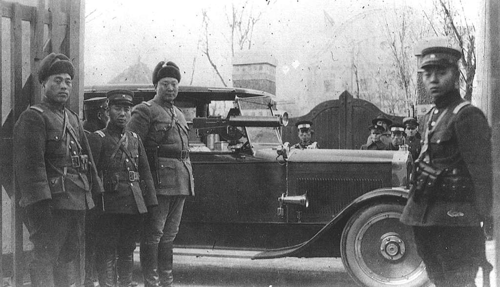 張作霖の公用車。